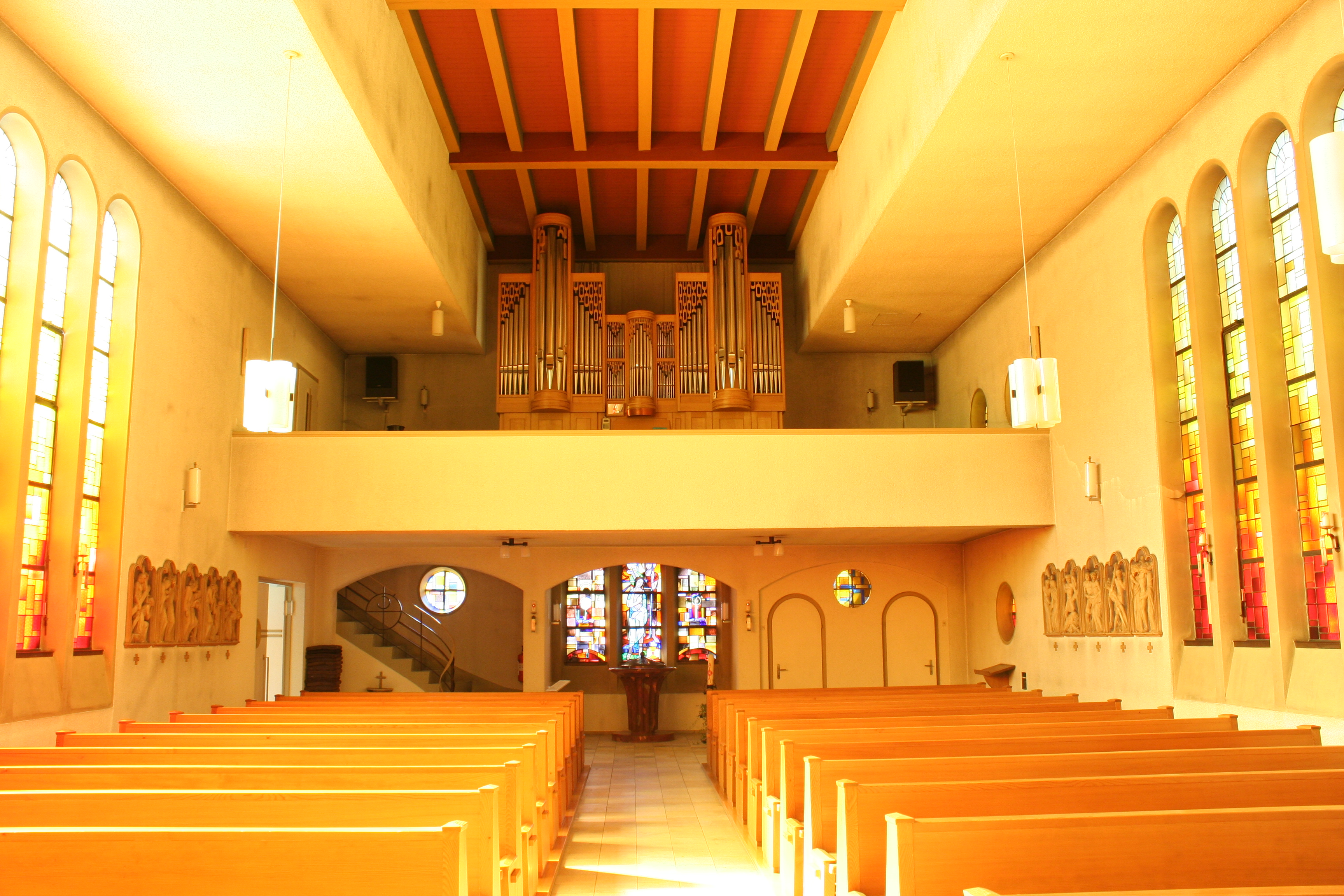 Römisch-katholische Pfarrkirche Herz Jesu Turbenthal, Orgelempore